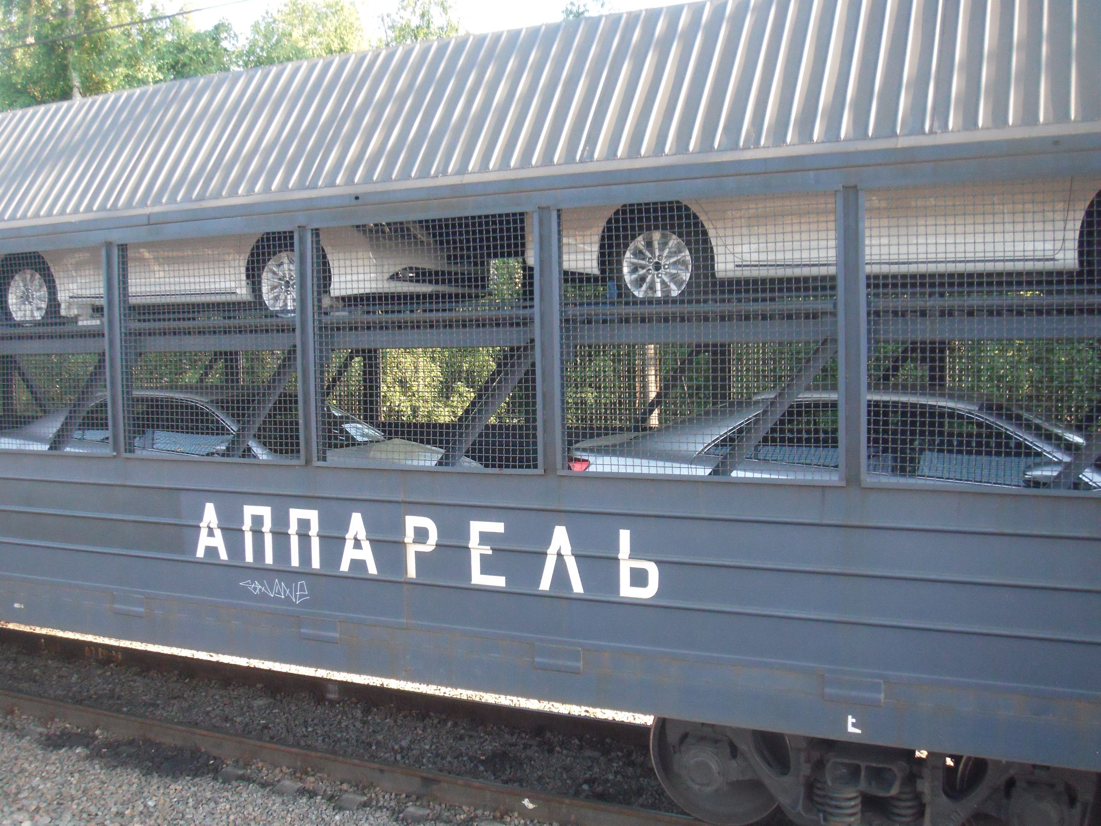 Белоостров (станция). Автомобили Хёндэй на станции отгрузки